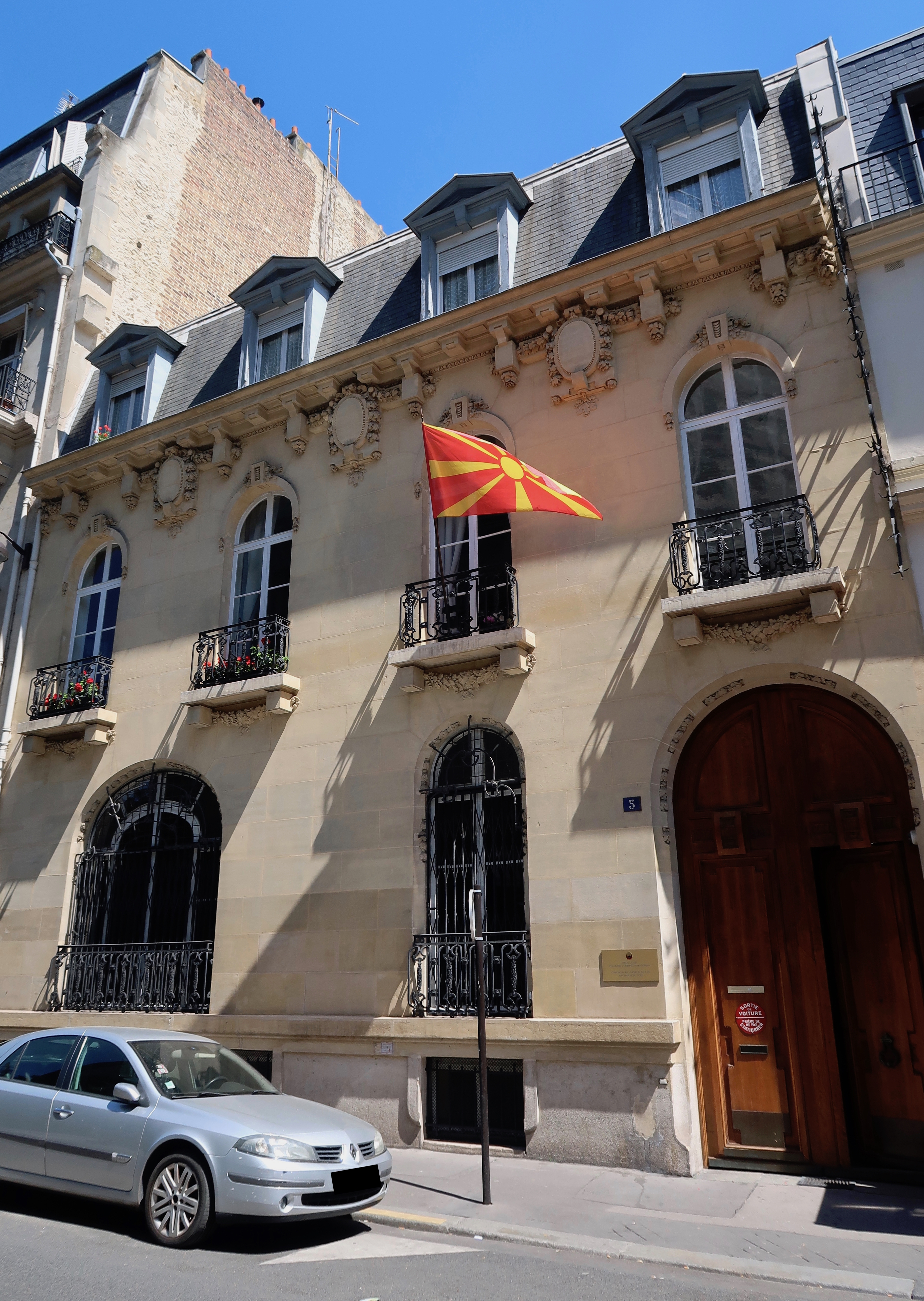 Ambassade de Macédoine en France, 5 rue de la Faisanderie (Paris, 16e).